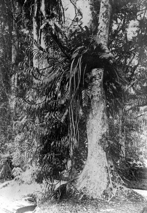 Repronegatief. Boom begroeid met exemplaar van de grote orchidee (Grammatophylum speciosum) in s'Lands Plantentuin in Buitenzorg.